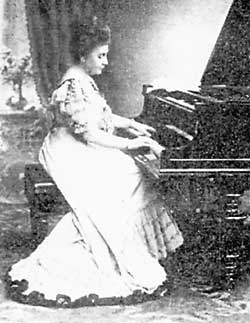 Timanova